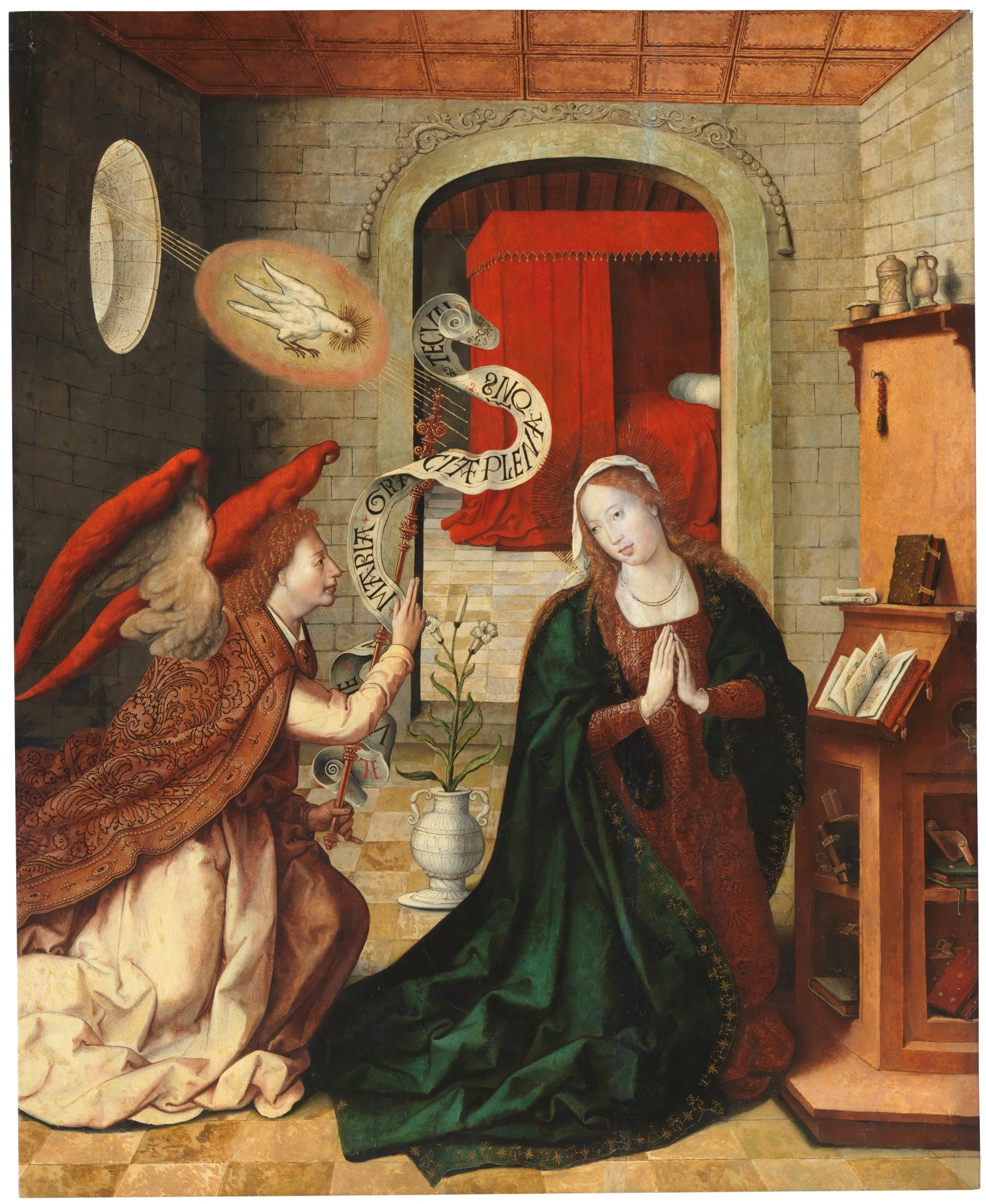 La obra representa el momento en que el arcángel San Gabriel anunció a la Virgen María que sería la madre del Mesías.